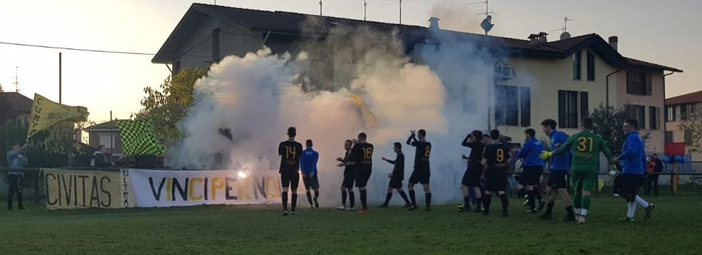 La squadra festeggia con la Curva C.